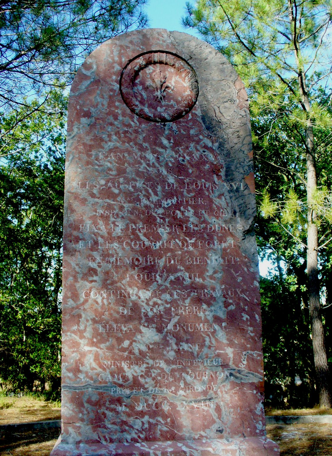 texte : L’an MDCCLXXXVI (1786), sous les auspices du roi Louis XVI, Nicolas Brémontier, inspecteur général des Ponts et Chaussées, fixa le premier ces dunes et les couvrit de forêts. En mémoire du bienfait, Louis XVIII, continuant les travaux de son frère, éleva ce monument. Antoine Laine, ministre de l’Intérieur, Camille, comte de Tournon, préfet de la Gironde MDCCCXVIII (1818).